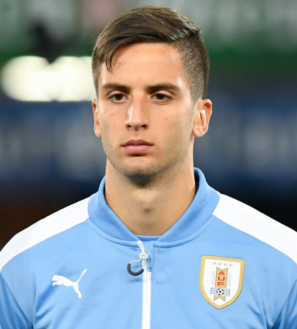 Wien, Österreich, 14.11.2017, Sport, Fussball, OEFB Freundschaftliches Laenderspiel - Österreich vs Uruguay. Bild zeigt Rodrigo Bentancur (URU).